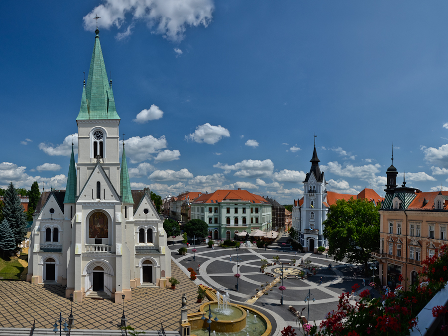 Kaposvár Kossuth tér